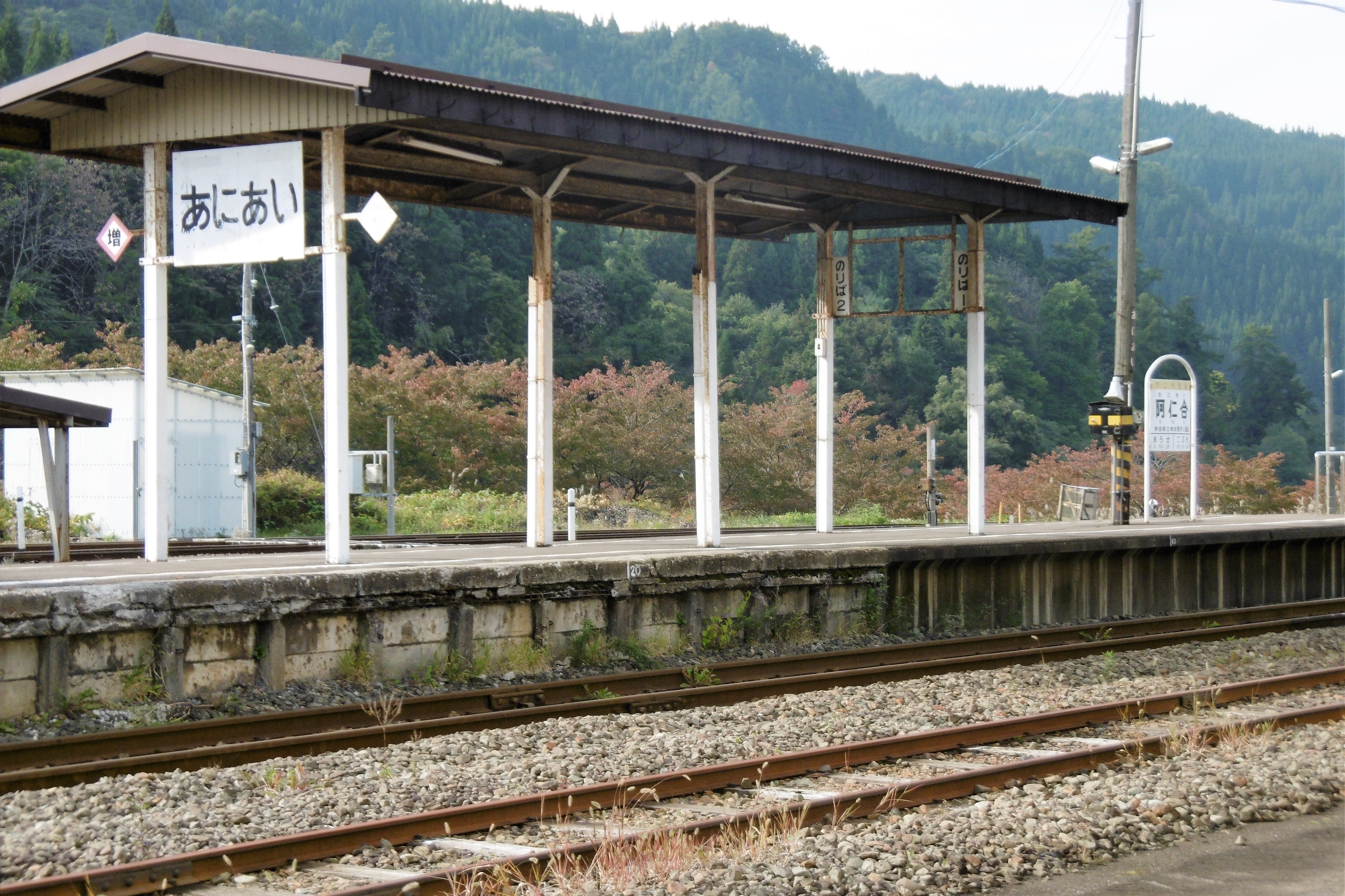 阿仁合駅プラットホーム：秋田県北秋田市阿仁銀山